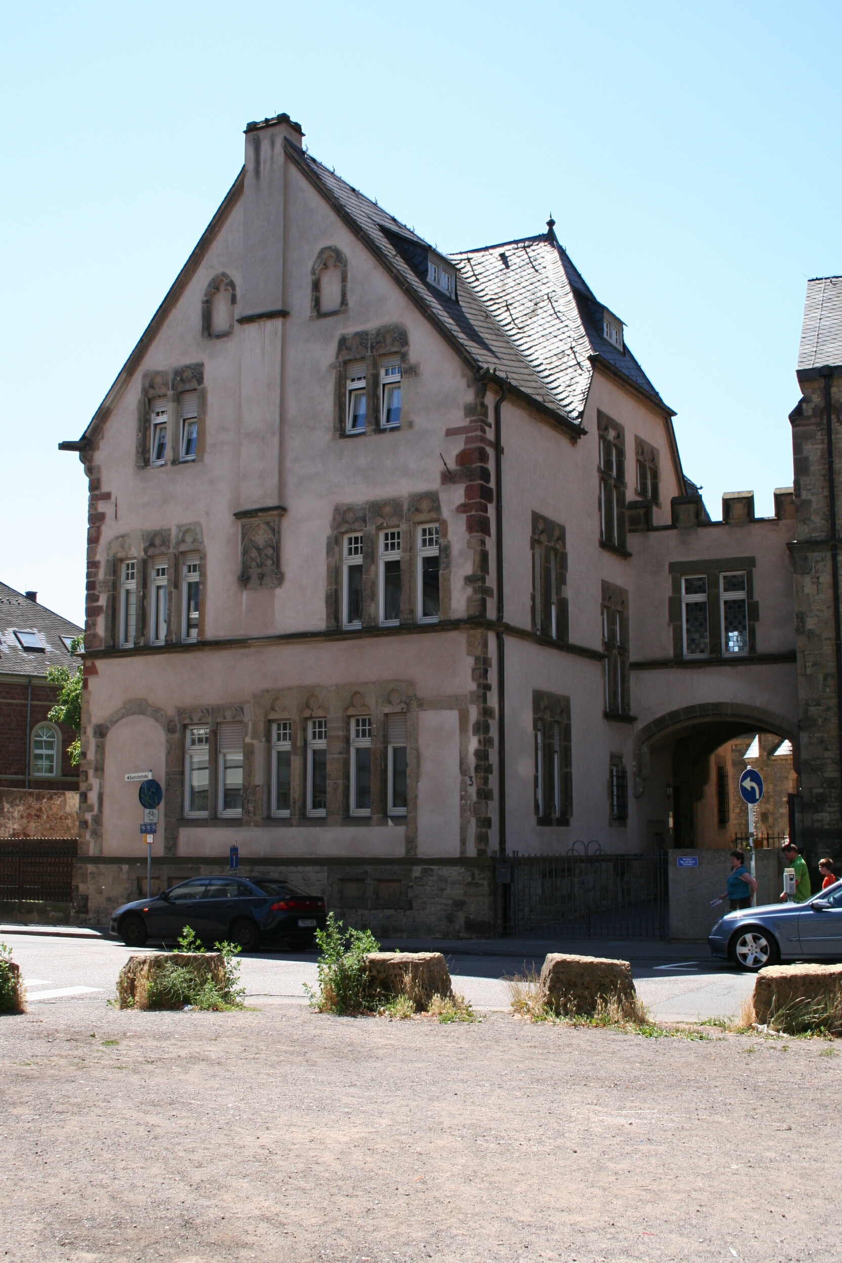 Trier, spätgotisches ehem. Stadtlazarett und Gefängnis am Paulusplatz, 1907 weitgehend abgebrochen und mit alten Bestandeilen als Pfarrhaus wieder errichtet.